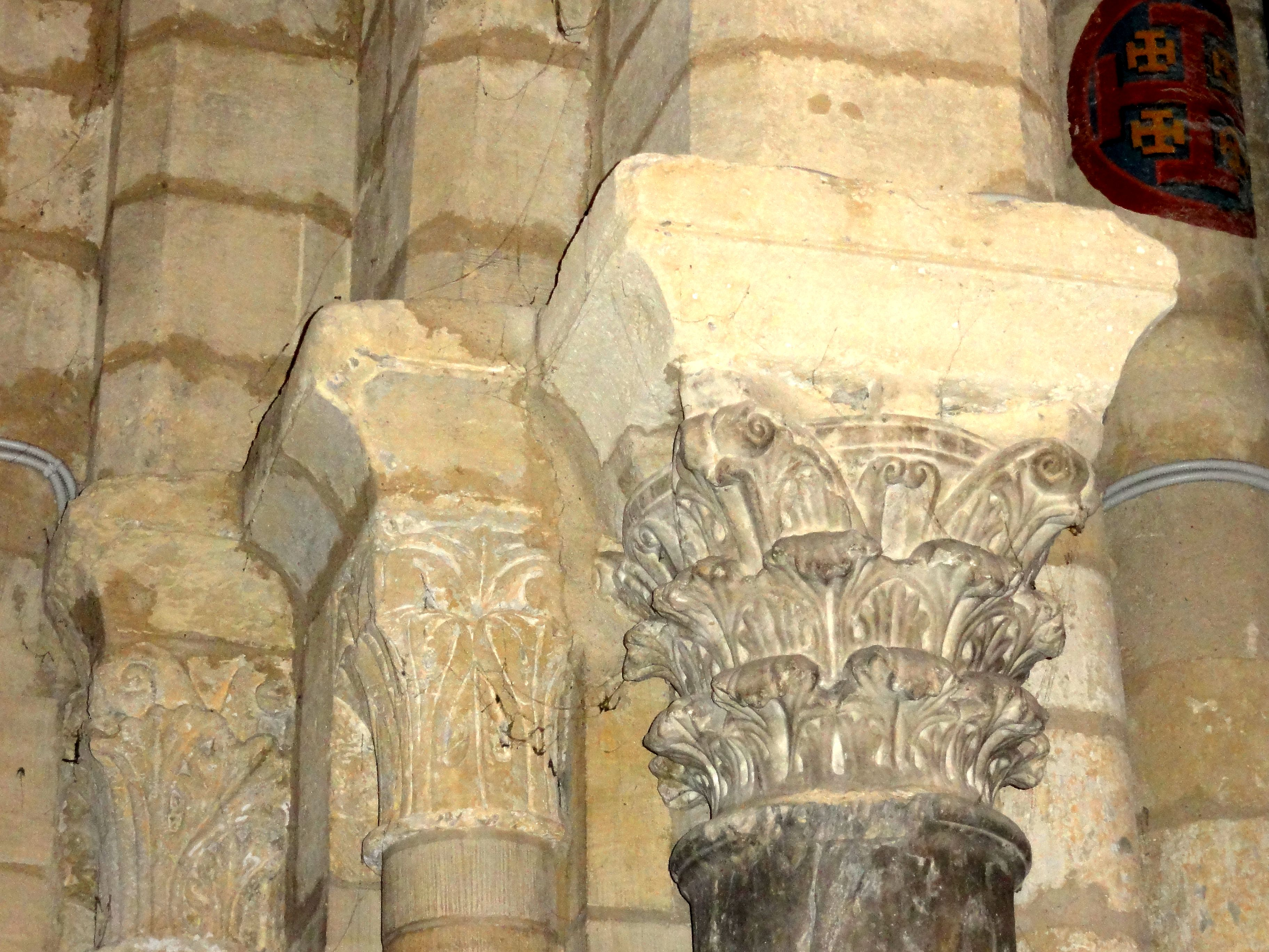 Bas-côté sud, 1ère travée, chapiteaux dans l'angle nord-ouest.